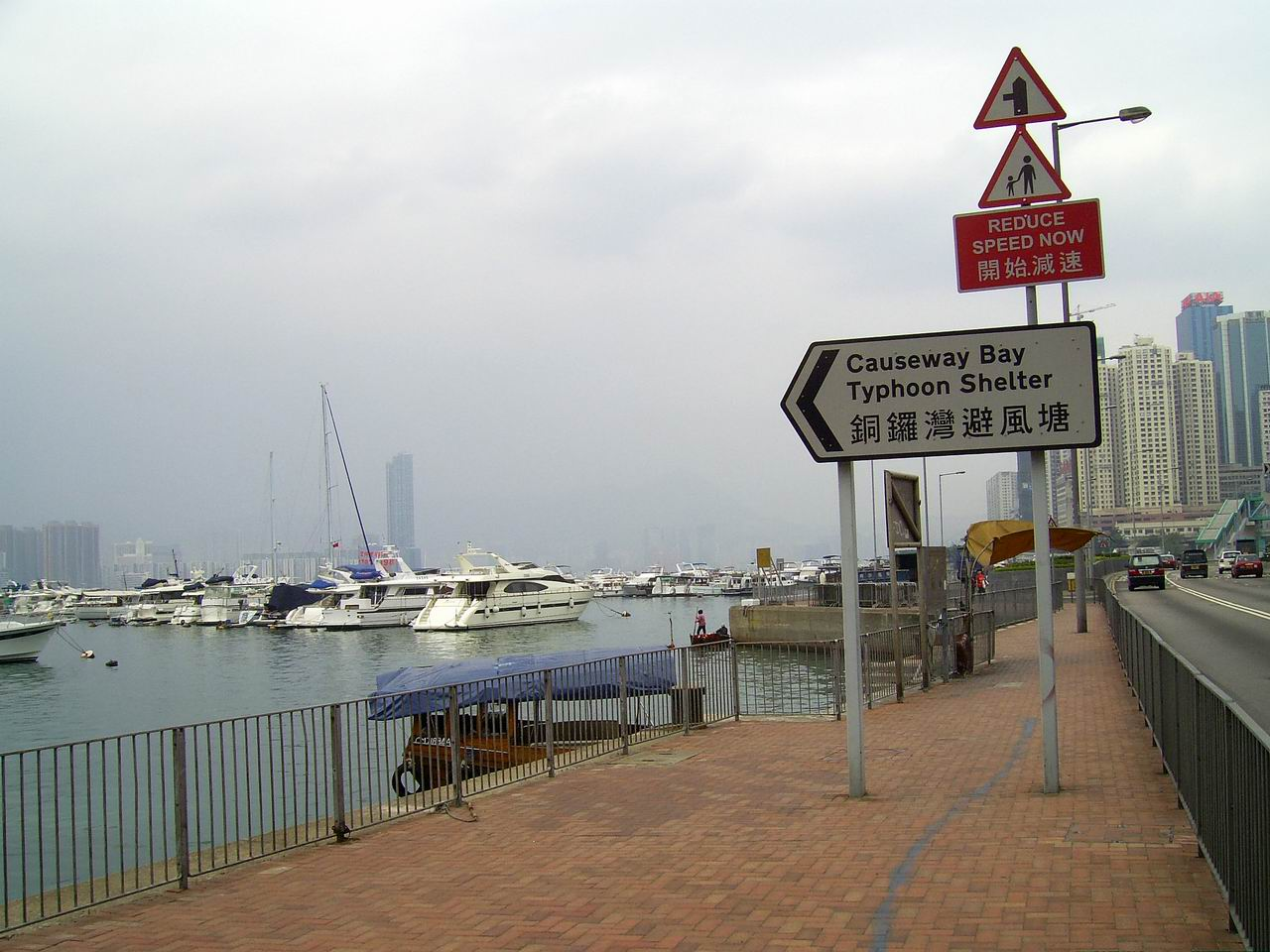 銅鑼灣避風塘